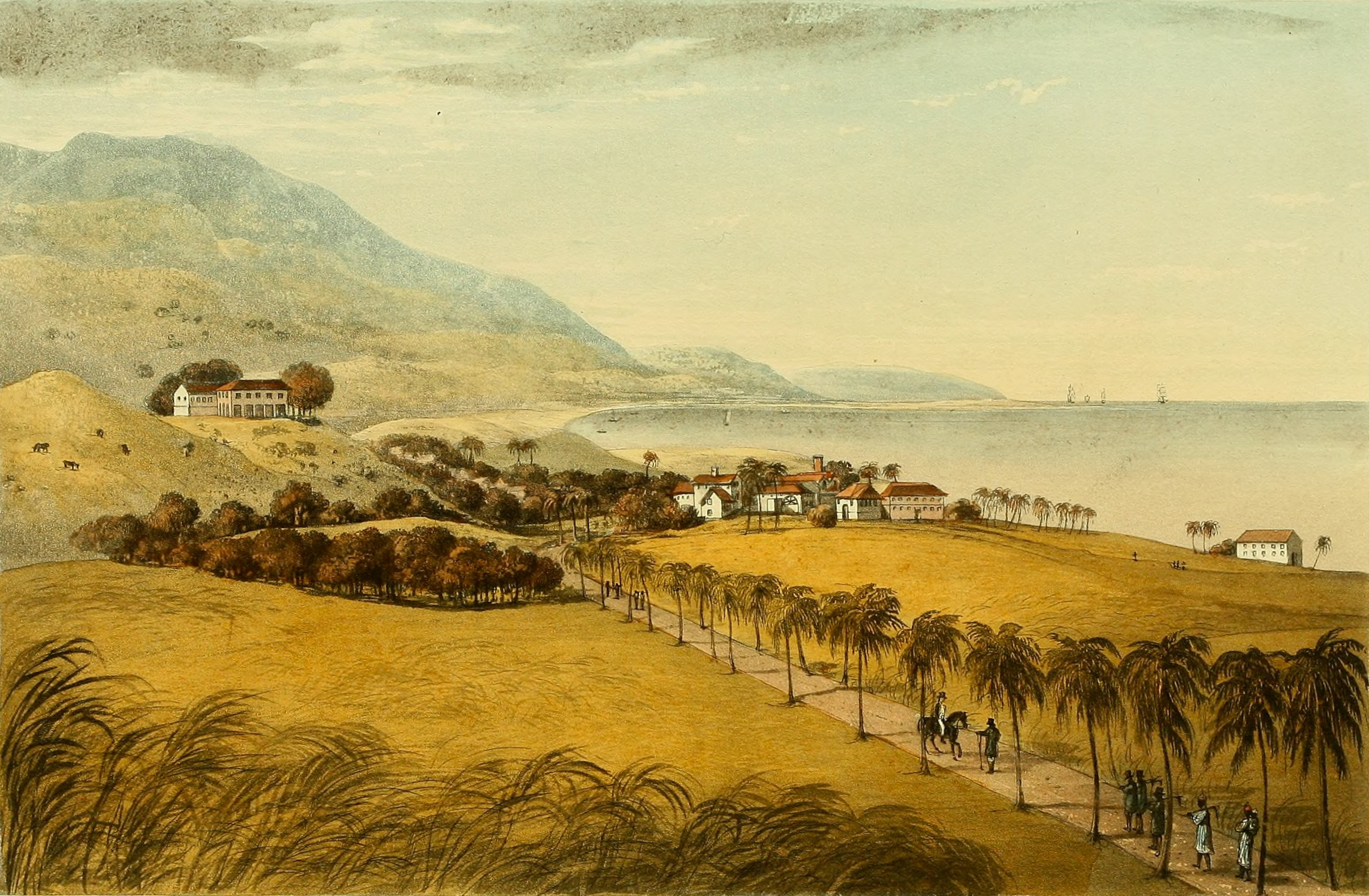 Spring Garden Estate, St. George's.